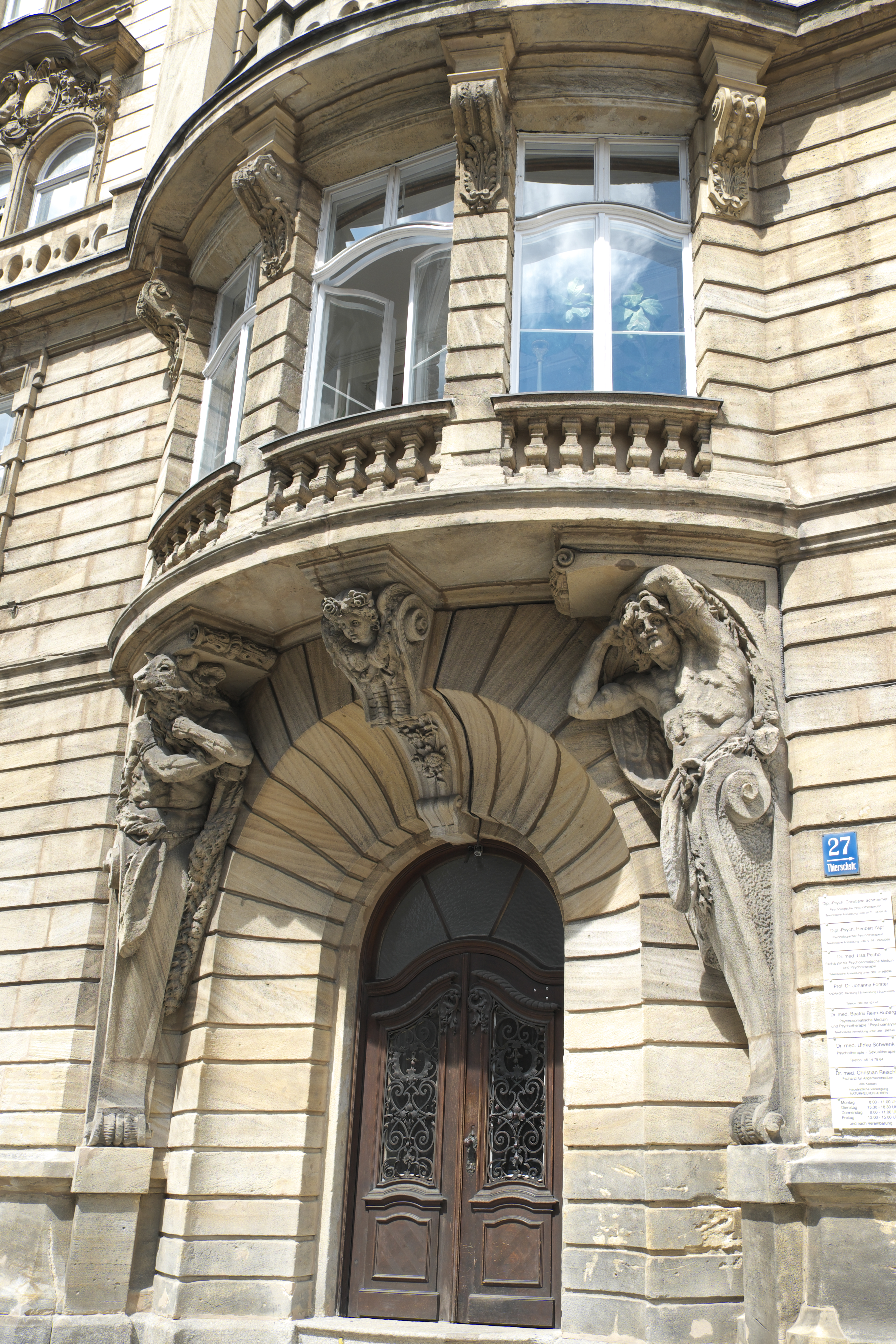 Mietshaus in der Thierschstraße 27 im Lehel im Stadtbezirk Altstadt-Lehel in München (Bayern/Deutschland), 1889 von Albin Lincke und Max Littmann gebaut, Atlant